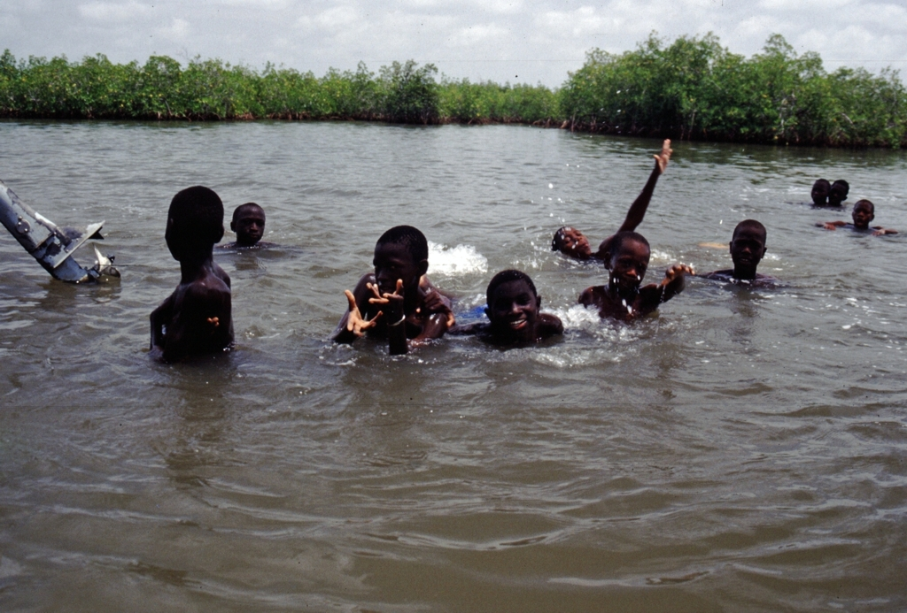 Badende Kinder an der Lamin Lodge